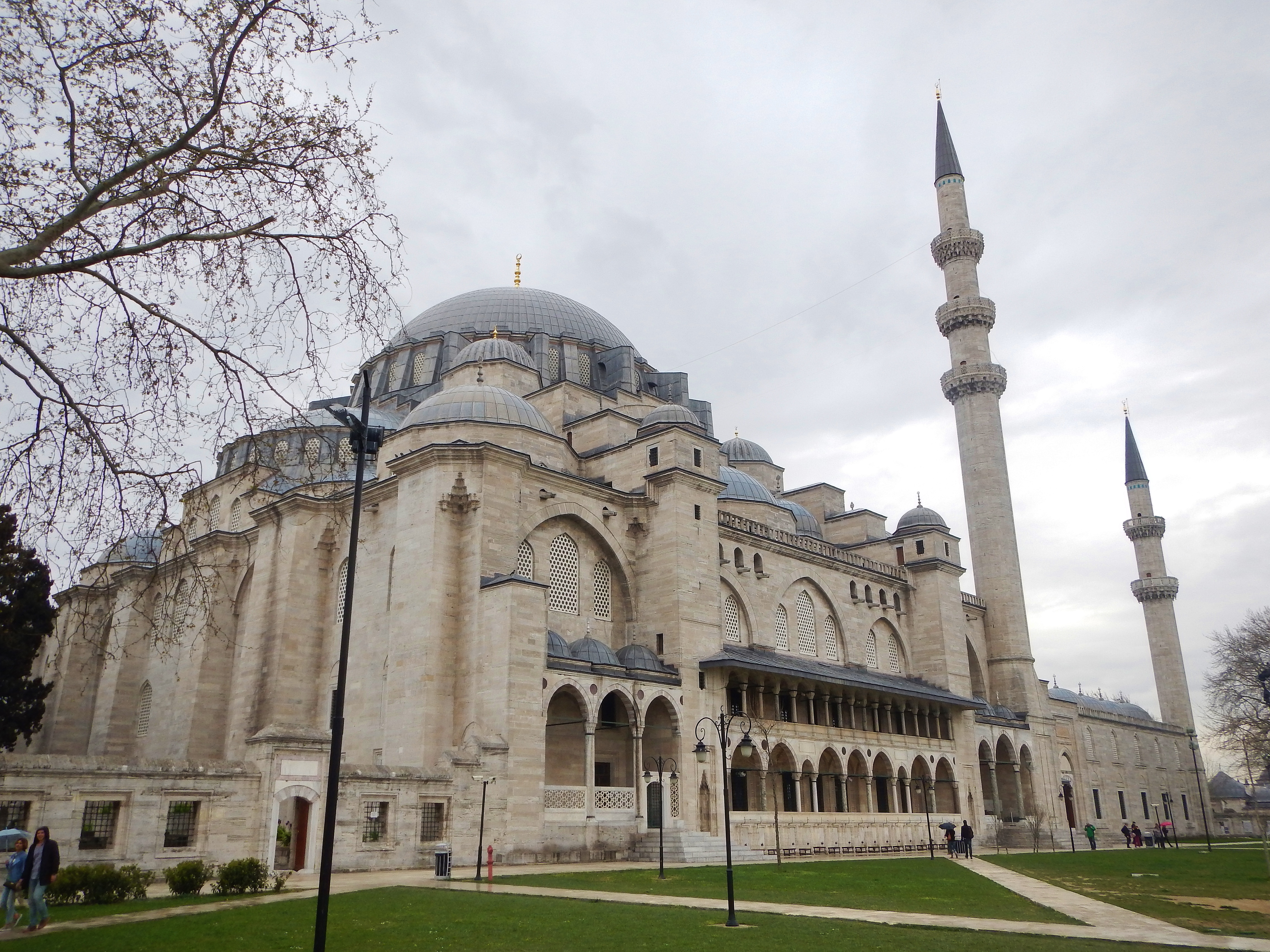 Süleymaniye Cami, Süleymaniye Moschee